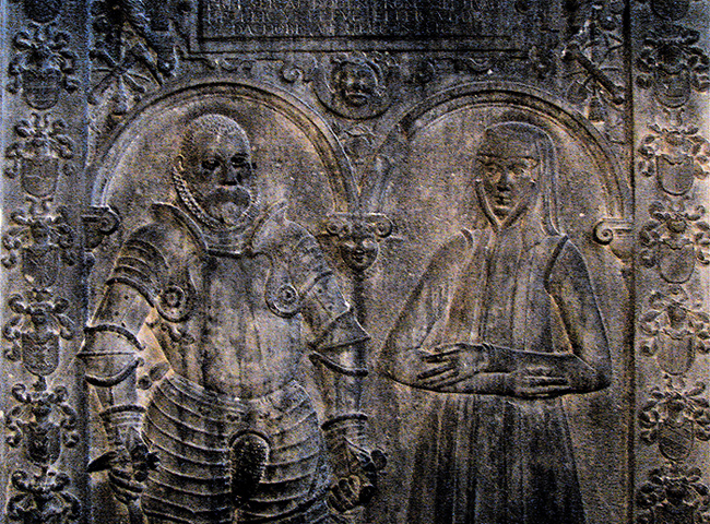 Steen Bille til Vandås, Vanås, Wanås og hustru Kirsten Lindenow, Sankta Maria Kirken, Helsingborg, Skåne